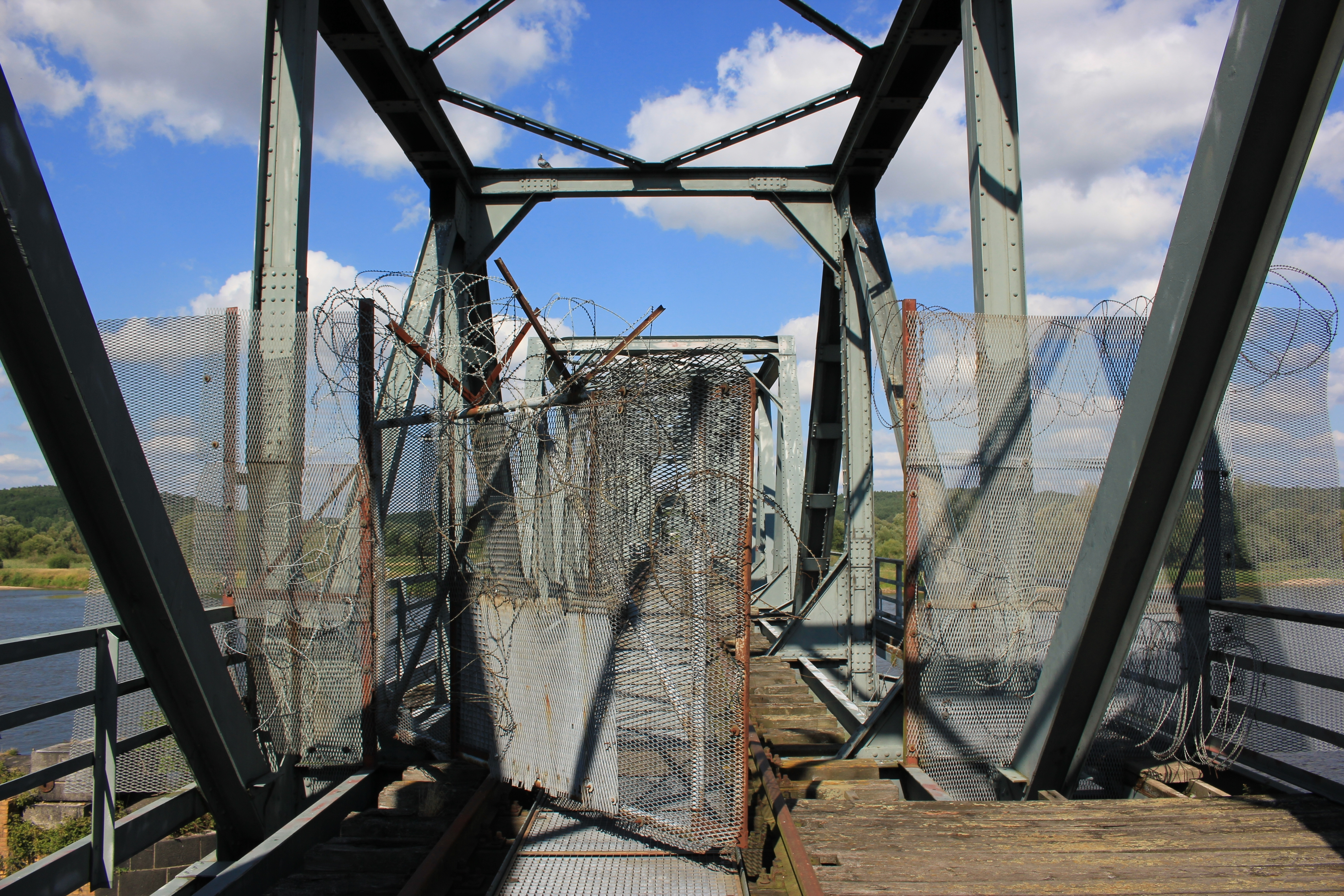 Eisenbahnbrücke über die Oder bei Bienenwerder.